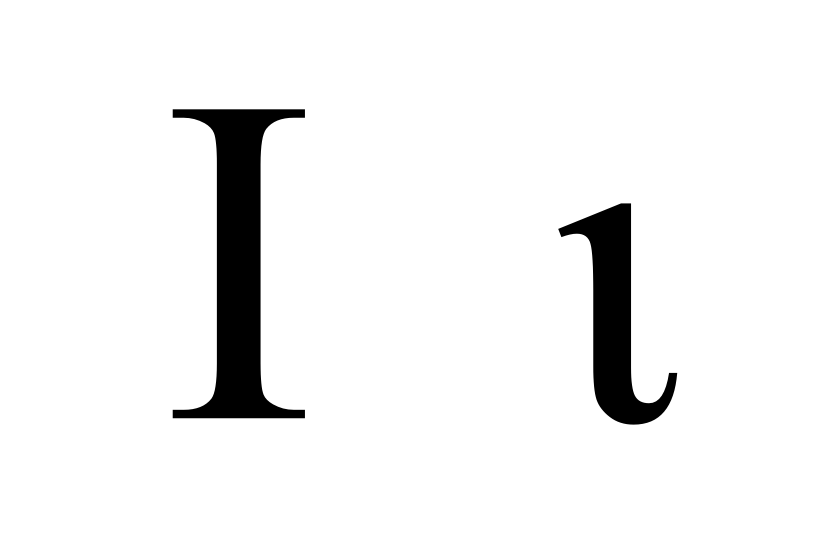 greek letter iota